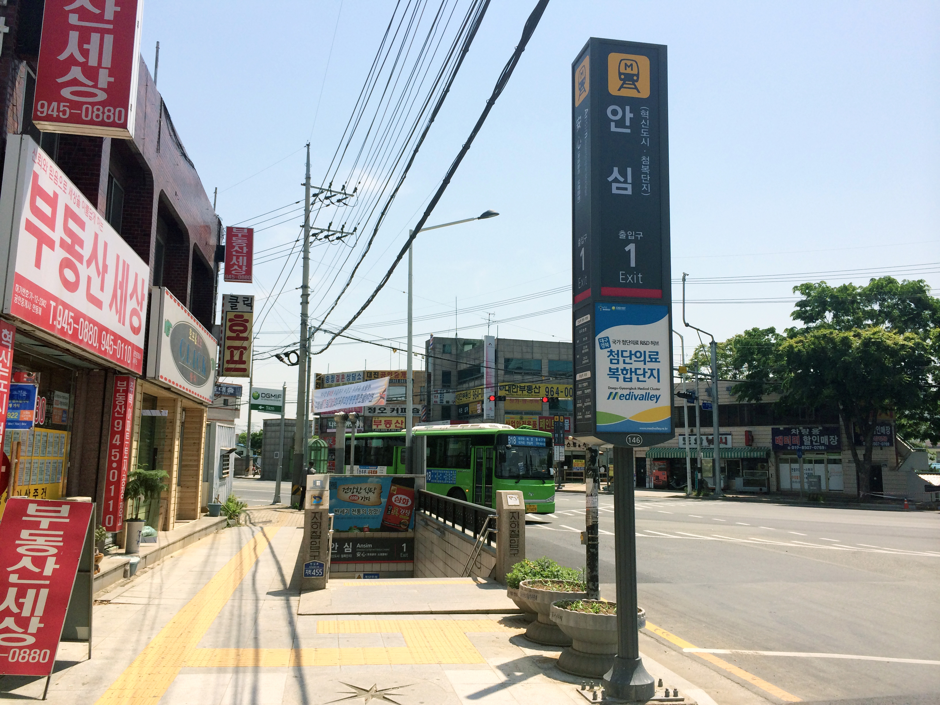 안심(혁신도시·첨복단지)역 1번 출입구